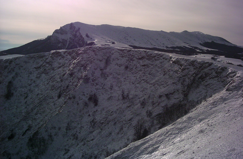 Чатырдаг. Верхнее плато зимой